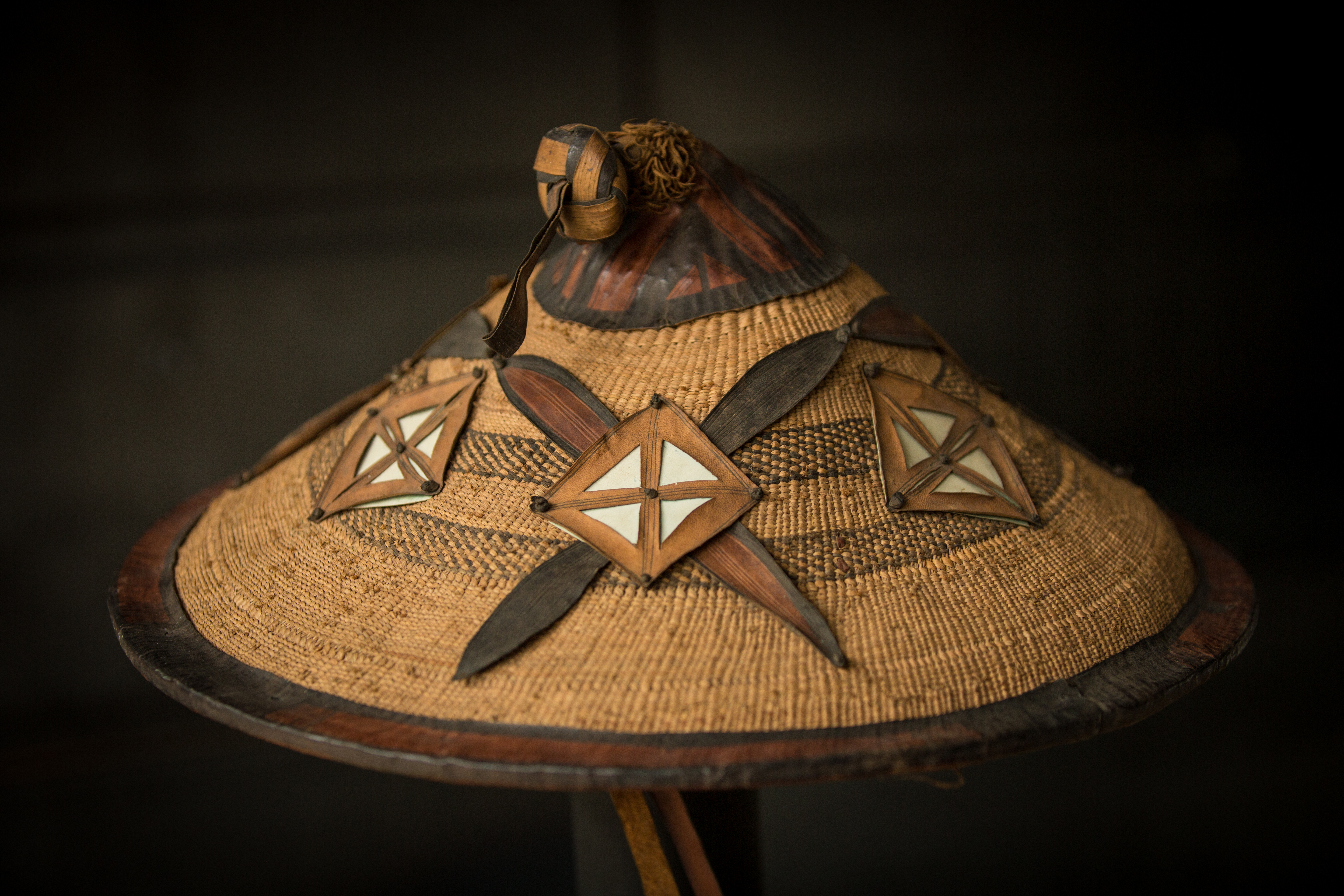 Chapeau berger Peul Provenance : Guinée, Fouta Djalon (Peul) Matériaux : végétal (fibres, carton) ; animal (cuir) Collections d'objets ethnographiques de l'université de Strasbourg (cf. fiche détaillée dans la base de données Ethno de la Maison interuniversitaire des sciences de l'homme - Alsace) N° d'inventaire : 2002.0.343